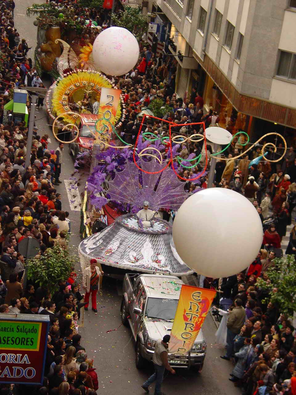 Santiago de Compostela - Galicia - España (Spain)